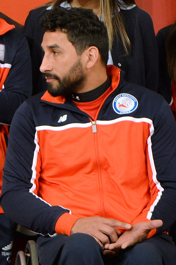 Gobierno de Chile